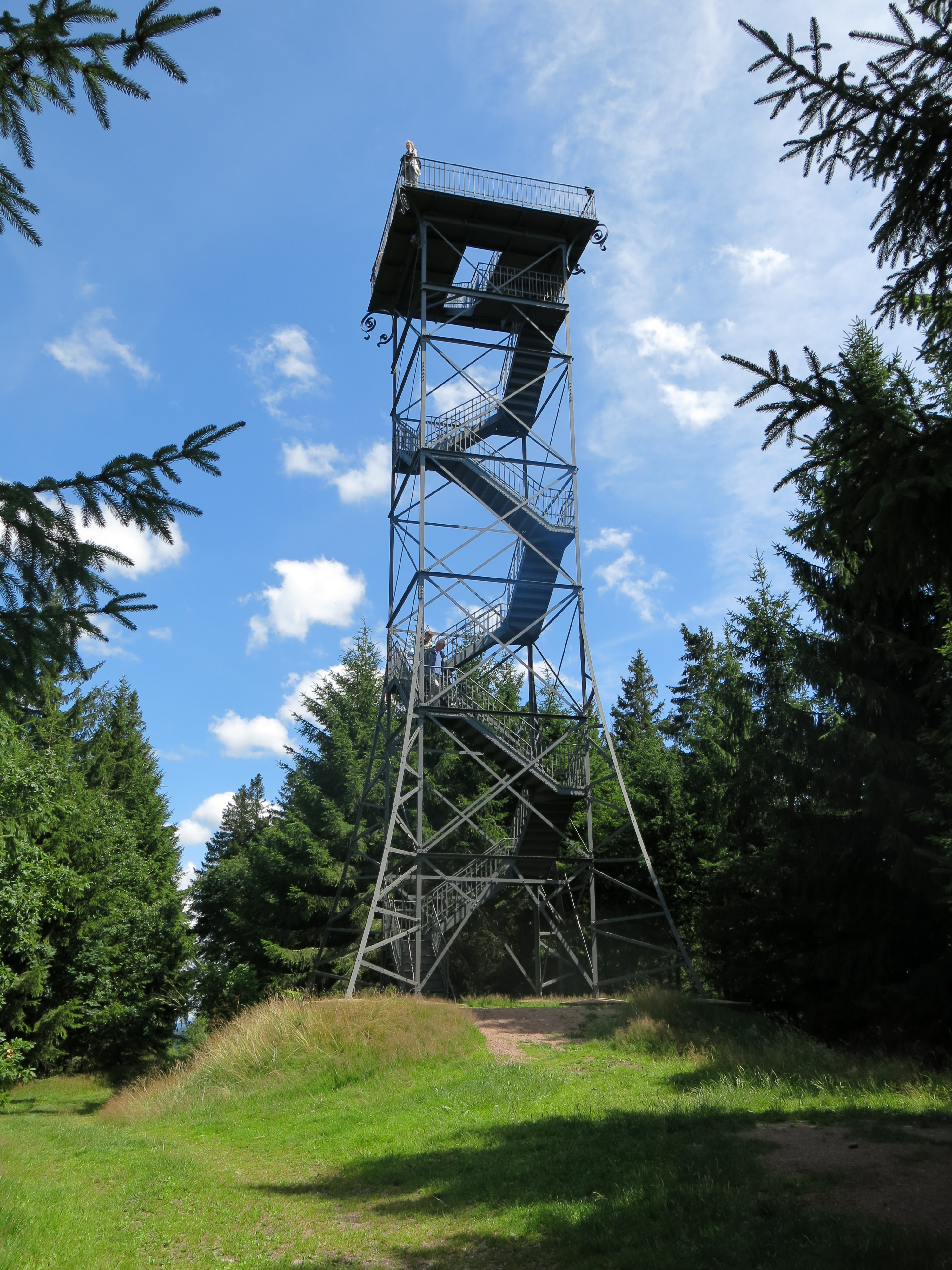 Der Carl-Alexander-Turm auf dem Ringberg im Thüringer Wald bei Rhula